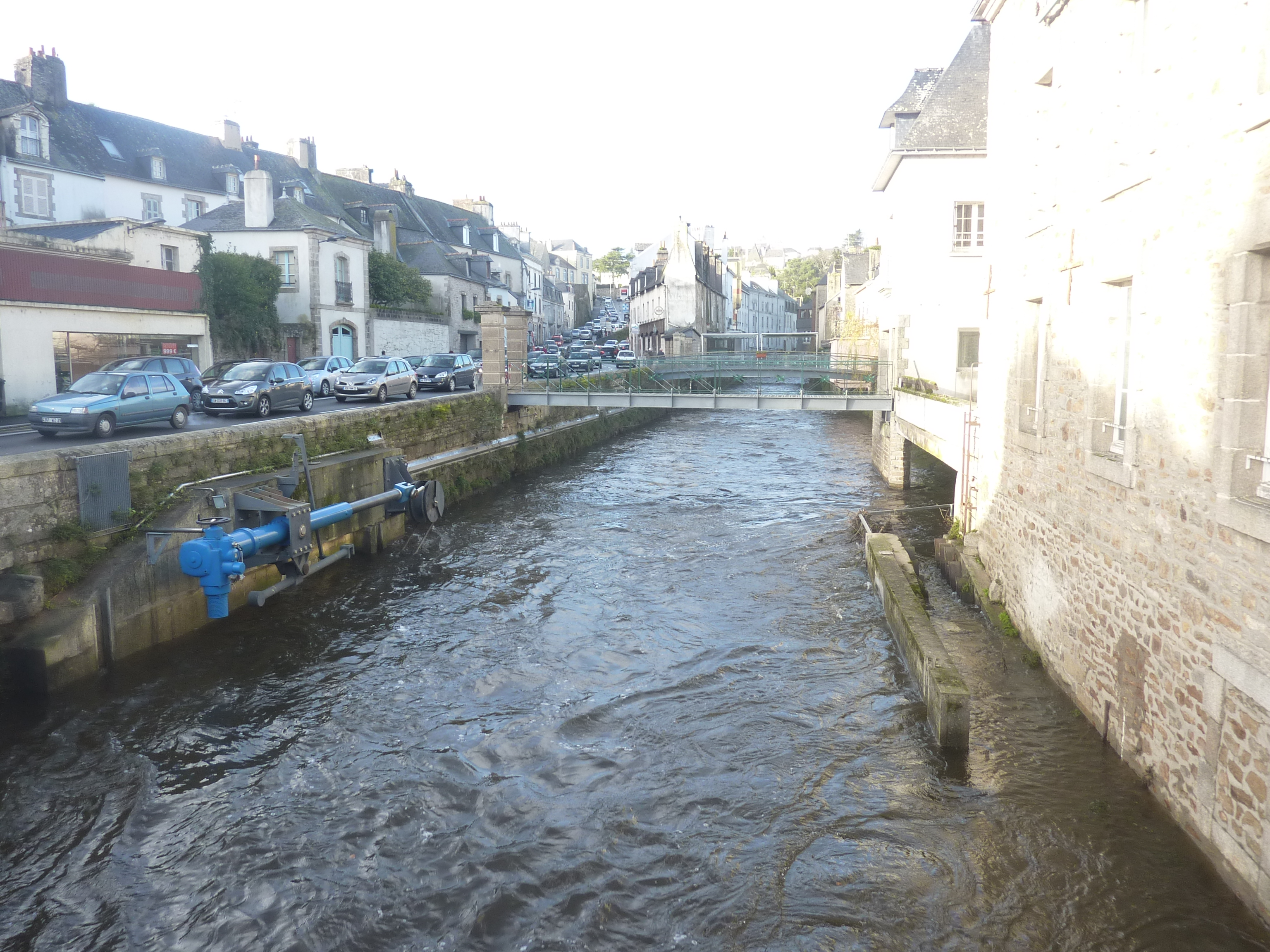 Quimperlé : l'Isole et ses passerelles en période de crue (3 janvier 2014) vu du pont du centre-ville ; le clapet mobile, en position basse n'est pas visible, mais son mécanisme de fonctionnement l'est partiellement.